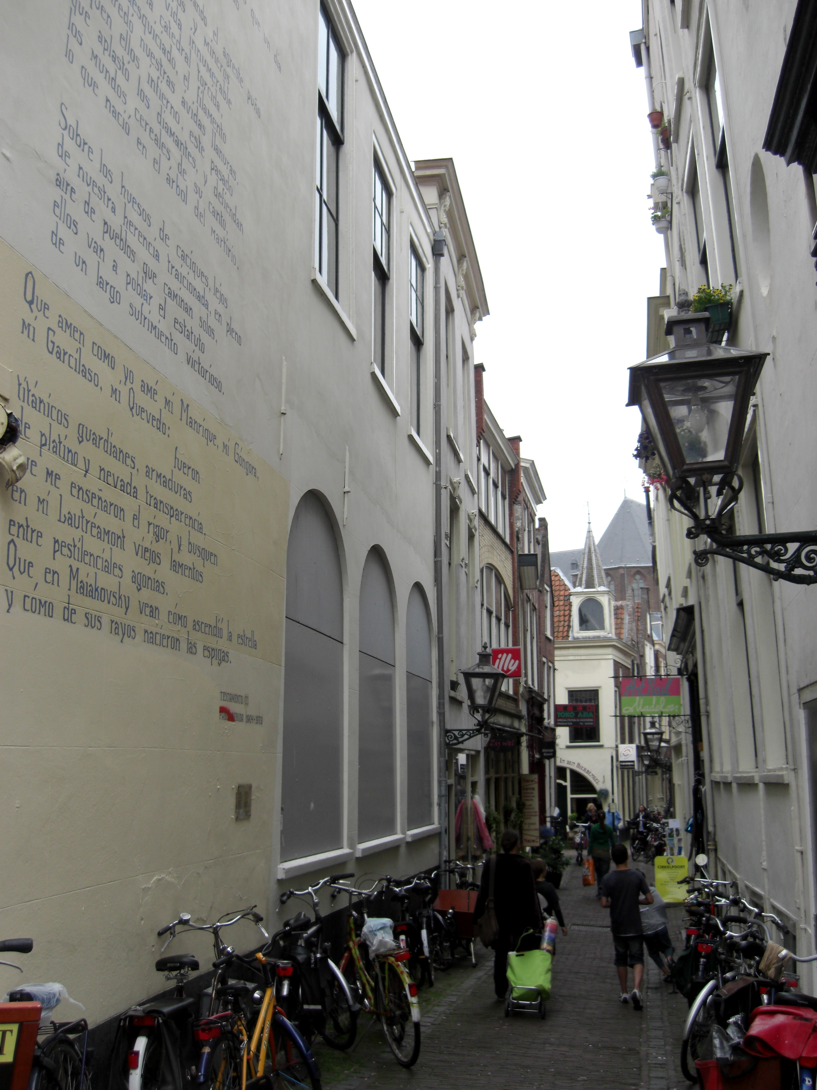 De Pieterskerk-Choorsteeg is een steegje in het centrum van Leiden tussen de Breestraat en de Pieterskerk. Er zijn vele winkeltjes en horeca-gelegenheden gevestigd. Op de hoek met de Breestraat staat een muurgedicht van Neruda.